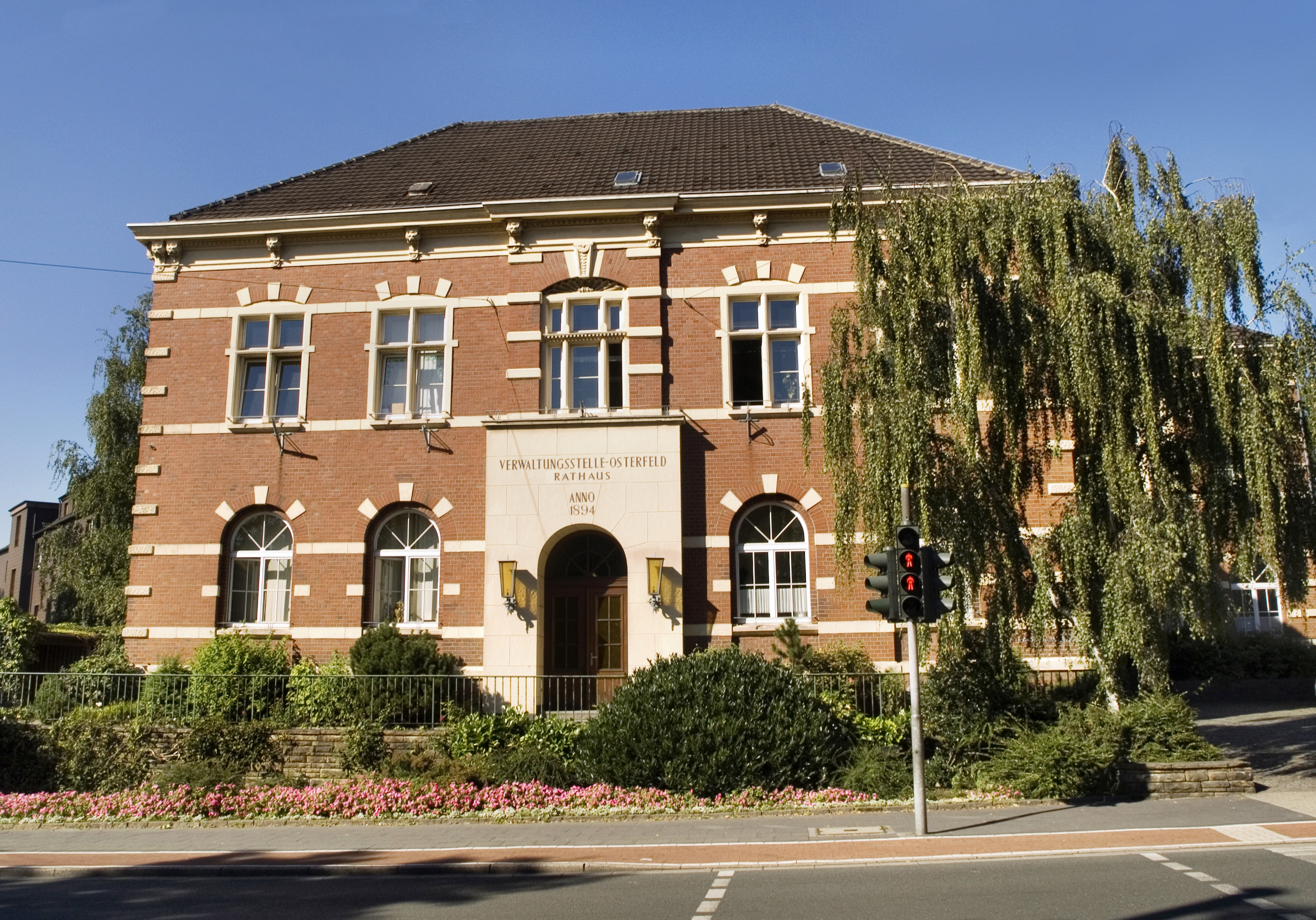 Северный Рейн - Вестфалия, Оберхаузен - ратуша района Остерфельд